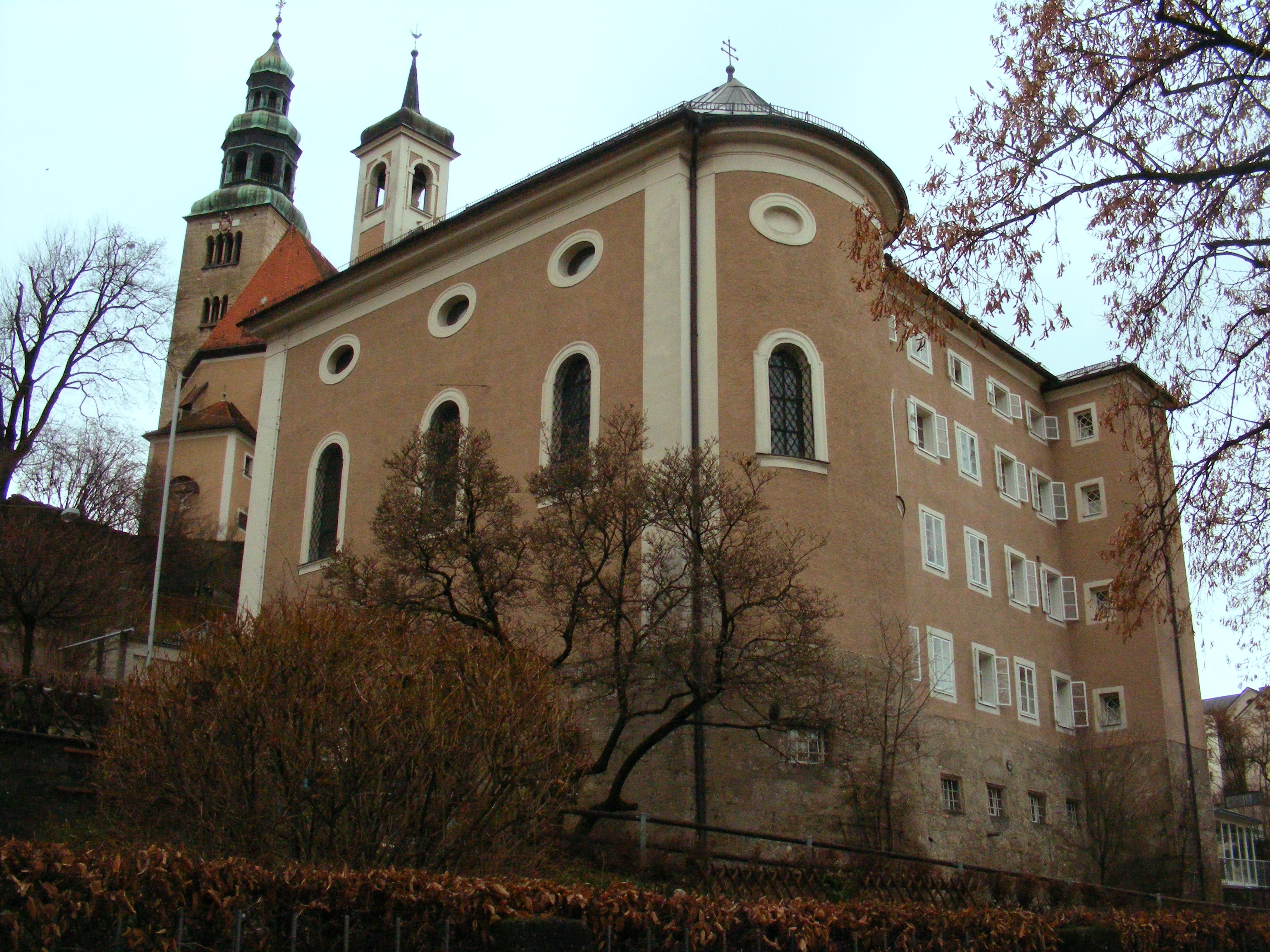 Leprosenhaus, Salzburg Mülln; Ansicht von der Salzachseite